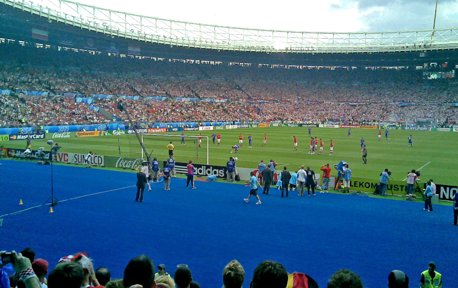 Elfmeter beim Spiel Österreich Kroatien im Ernst-Happel-Stadion während der EM 2008